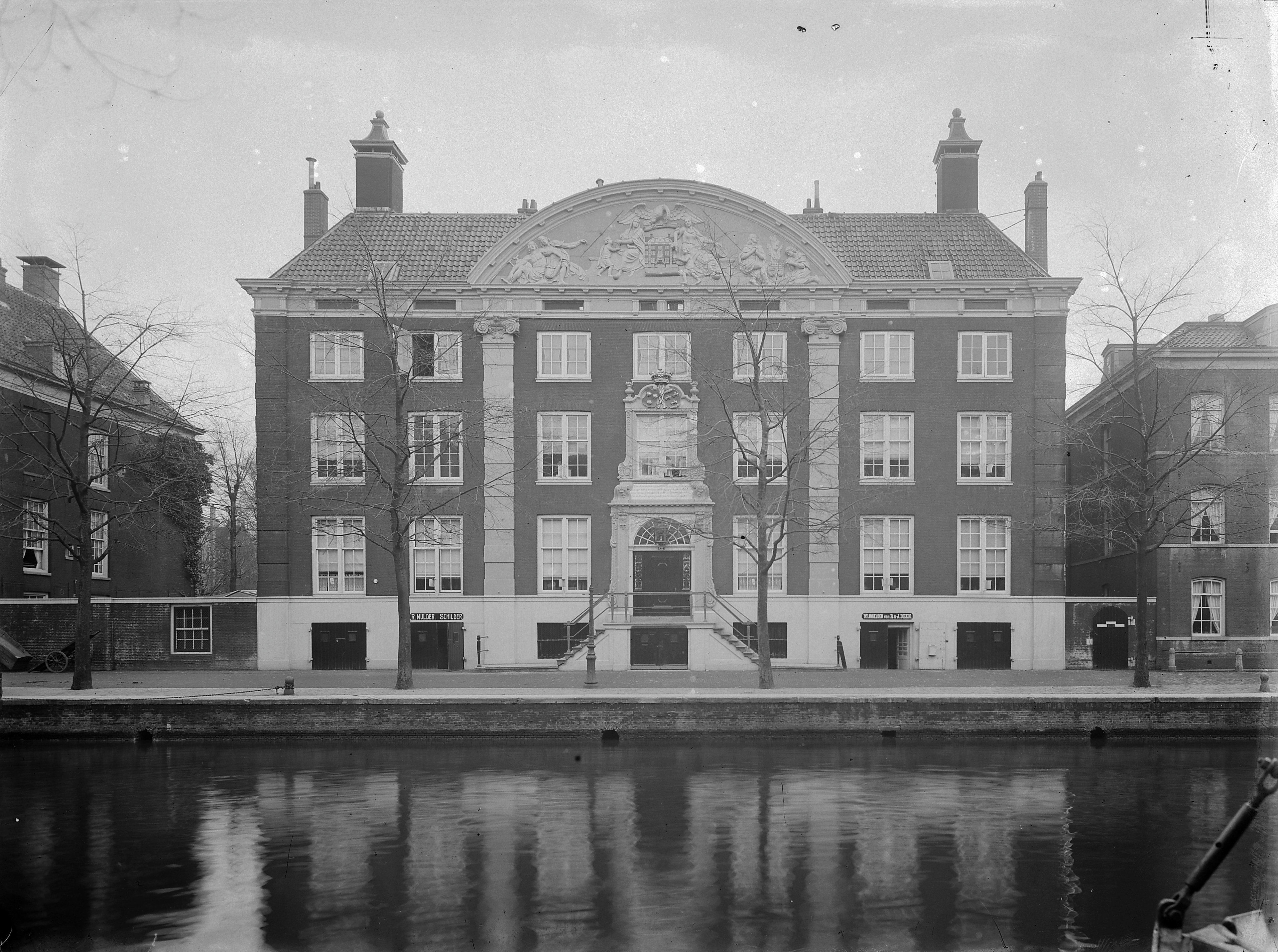 Corvershof: Overzicht voorgevel (opmerking: In: Buiten ; 15(1921), nr. 37, p. 436)